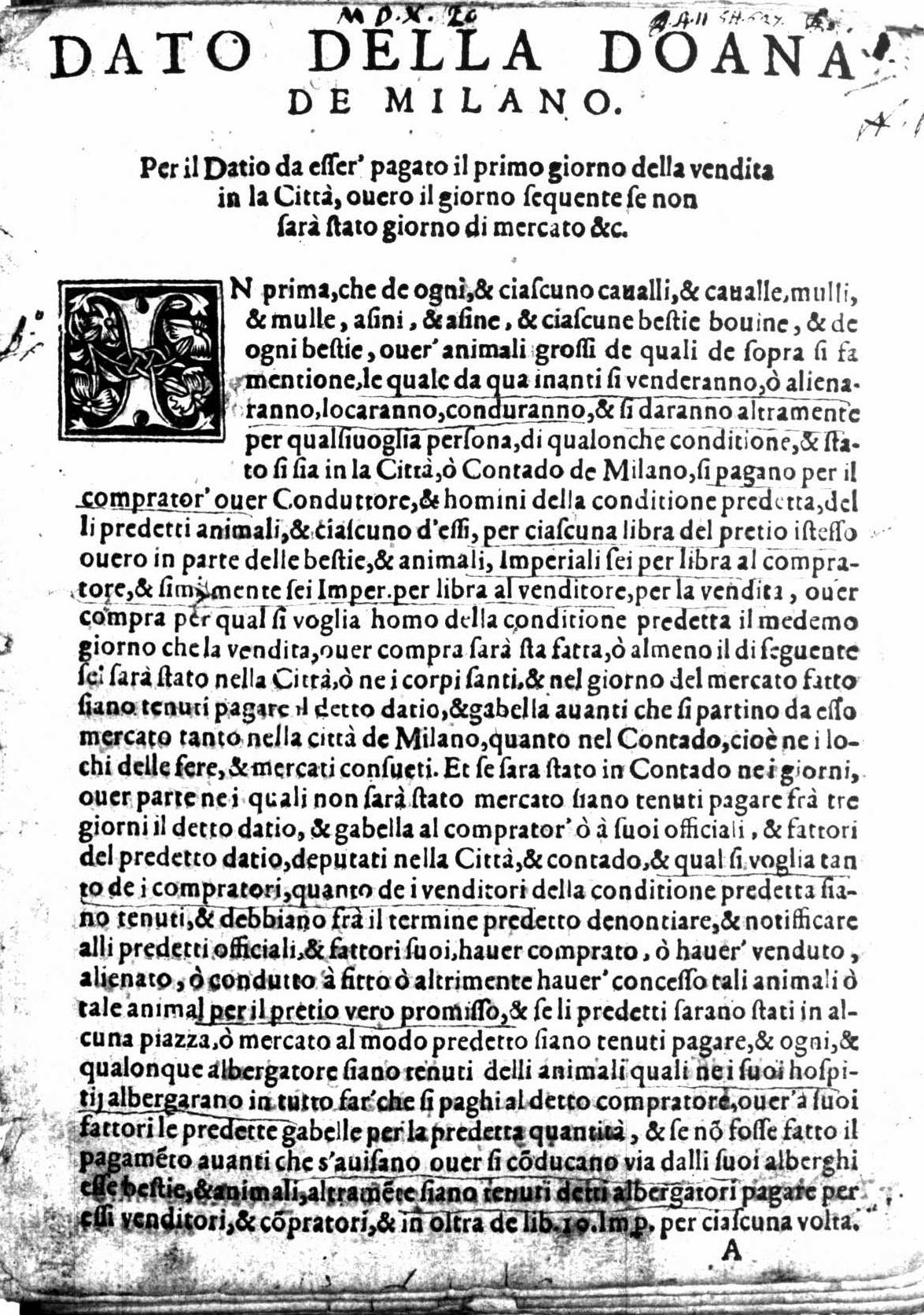 pagina